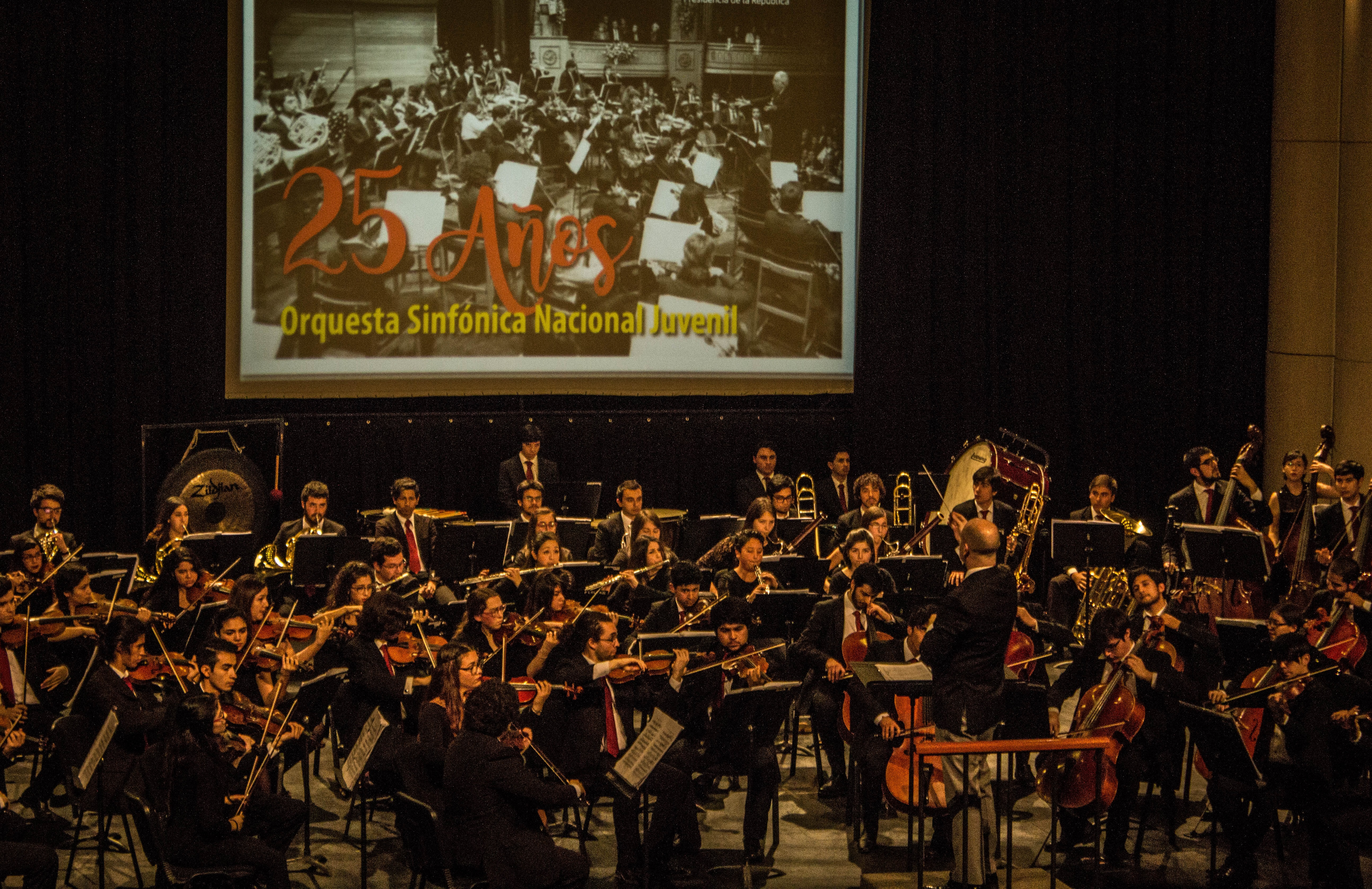 Orquesta Sinfónica Nacional Juvenil (OSNJ) celebra sus 25 años de vida bajo la batuta de José Luis Domínguez. Junio de 2017.